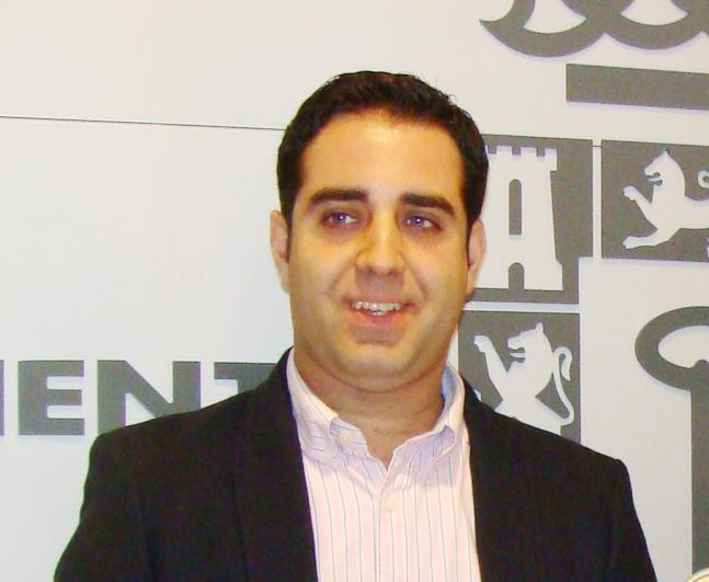 Retrato de Carlos Hinojosa